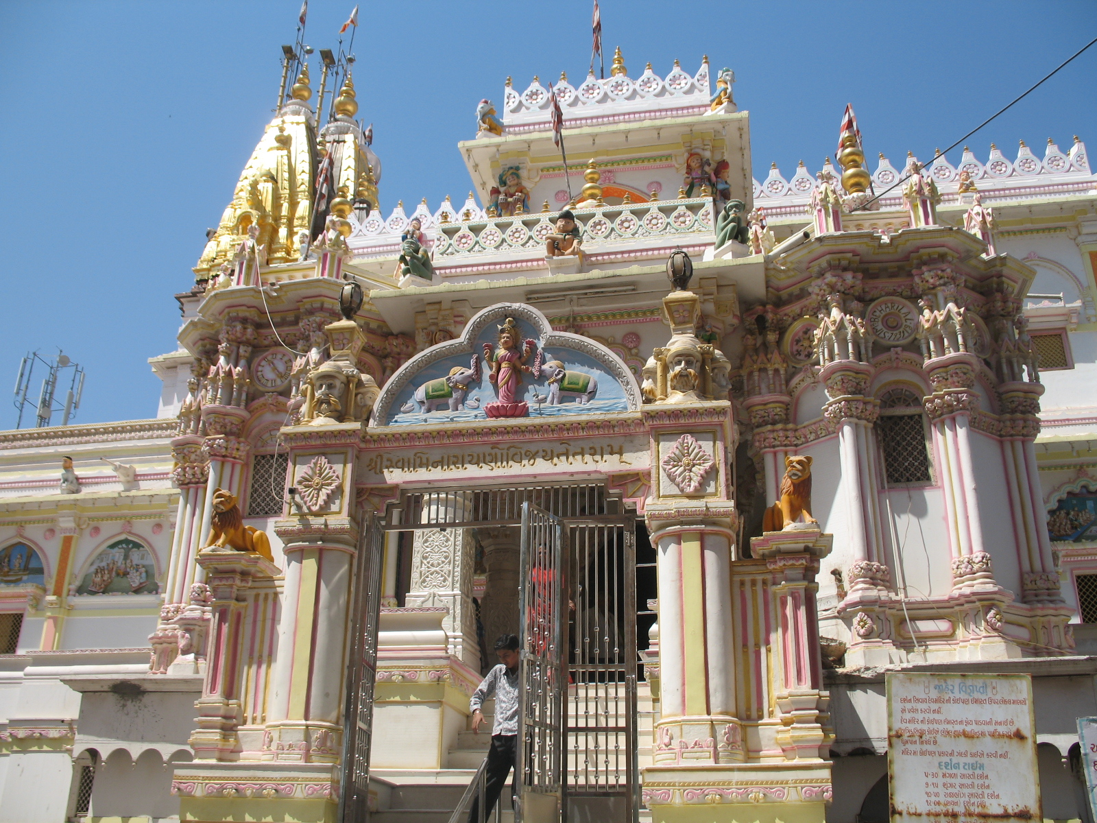 Swaminarayan Temple, Gadhada